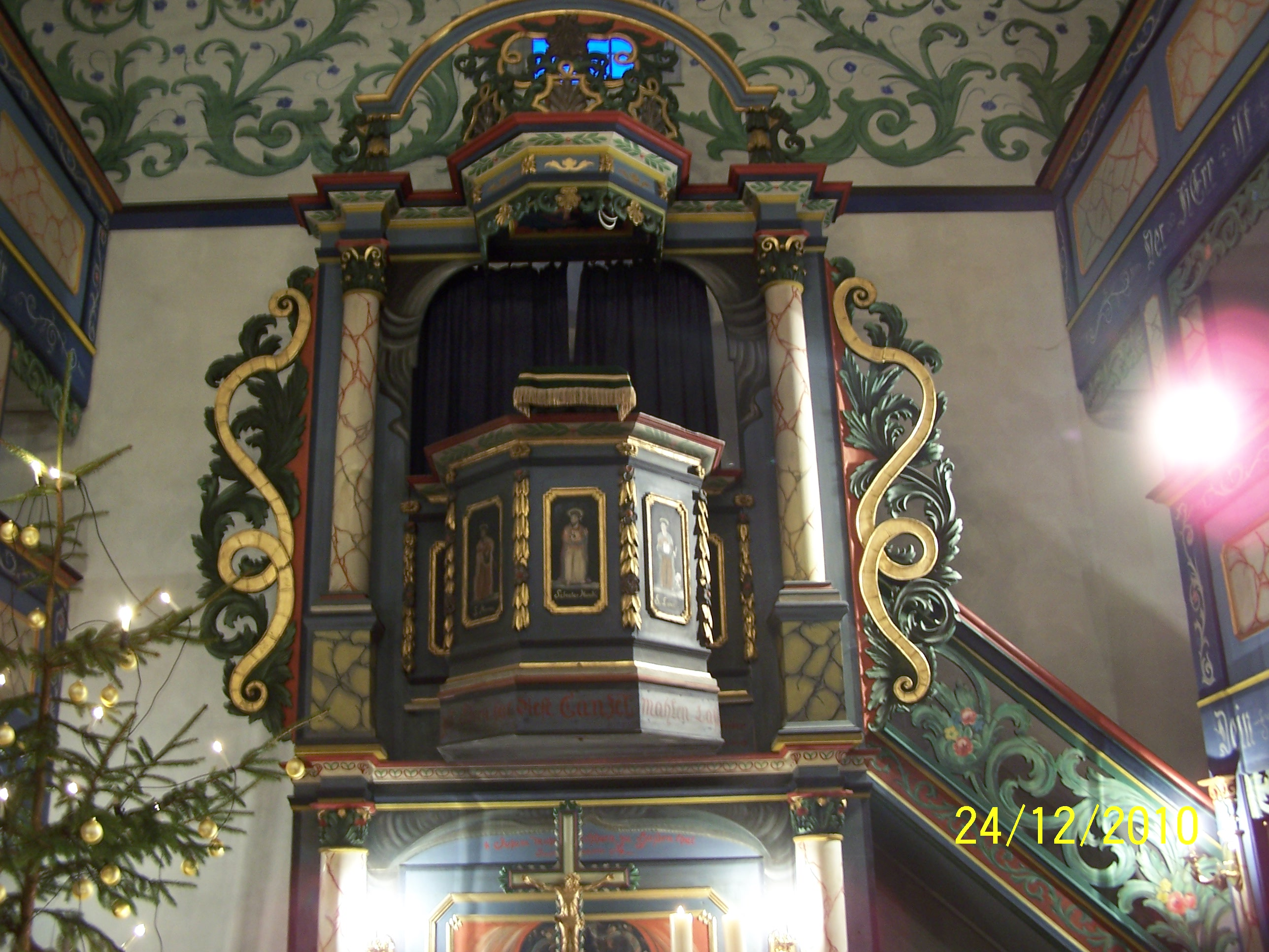 Kanzel der Matthäuskirche